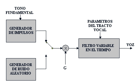 Aparato Fonador Humano